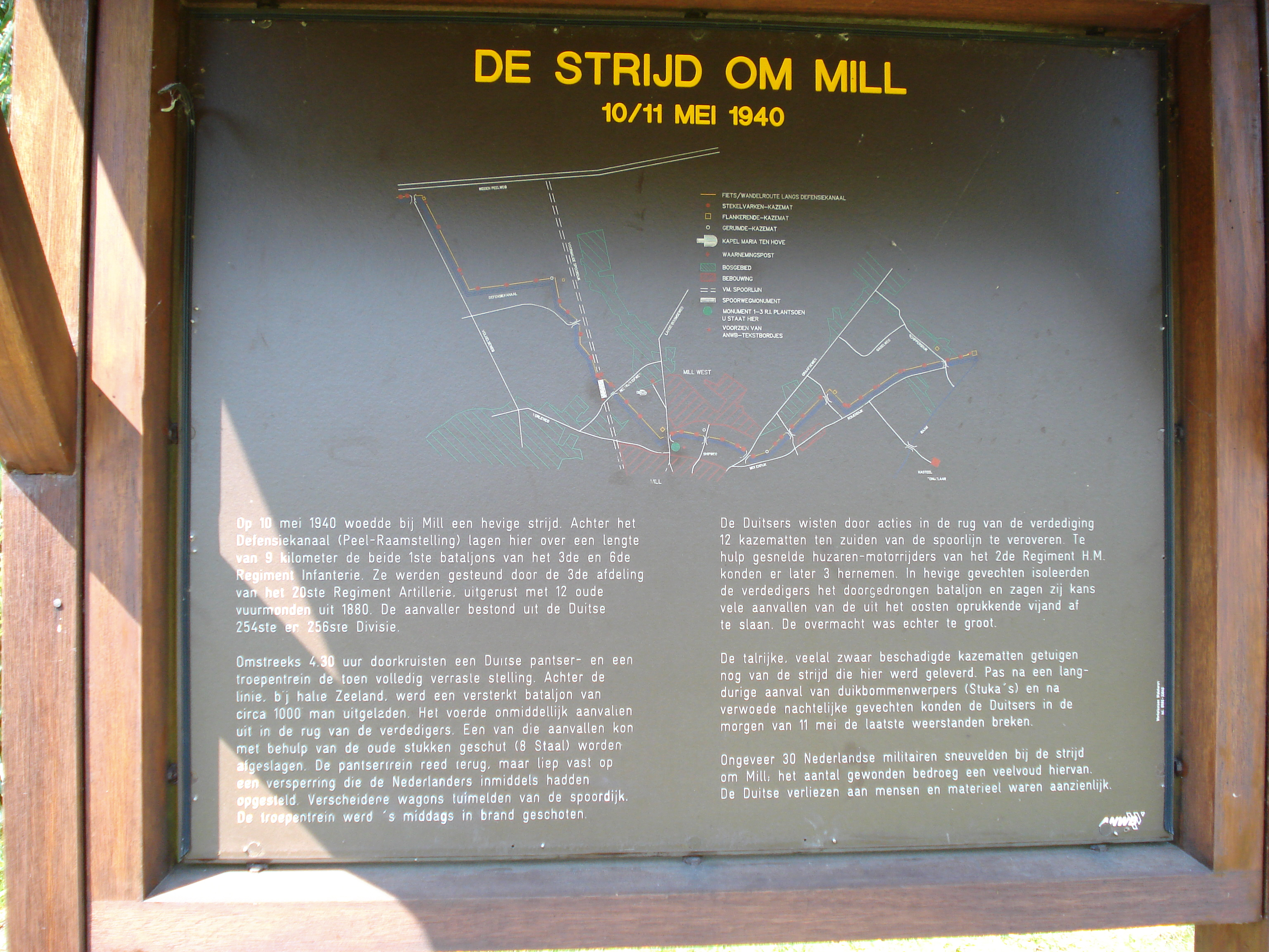 Mill, North Brabant, panneau explicatif de la bataille du 10-11 mai 1940